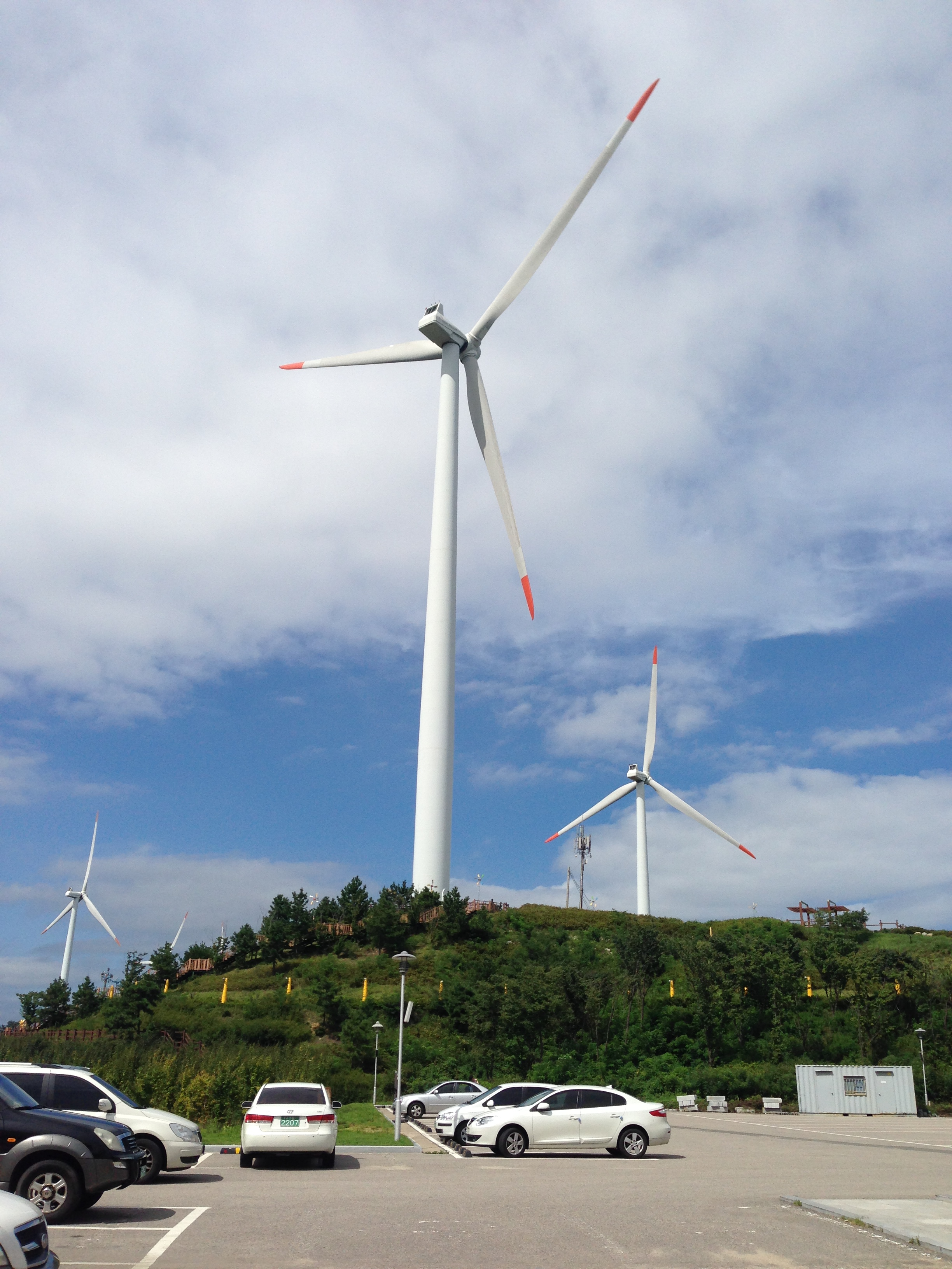 서울특별시 소방재난본부 안전지원과 지방안전체험관 견학(영덕소방서, 영덕 신재생 에너지 전시관, 전라북도 119안전체험관)